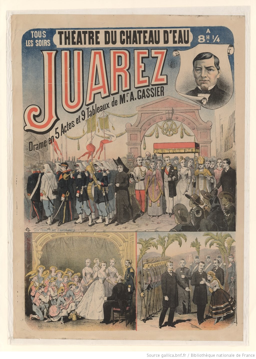 Affiche de théâtre Juarez drame de Gassier (1886)